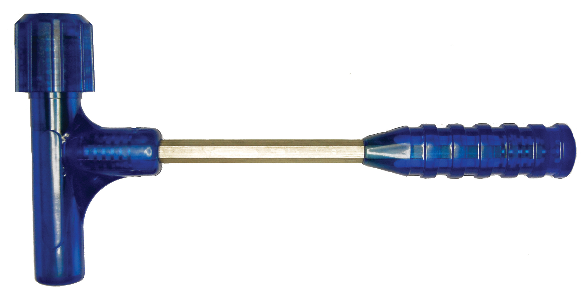 Mlotek kinetyczny